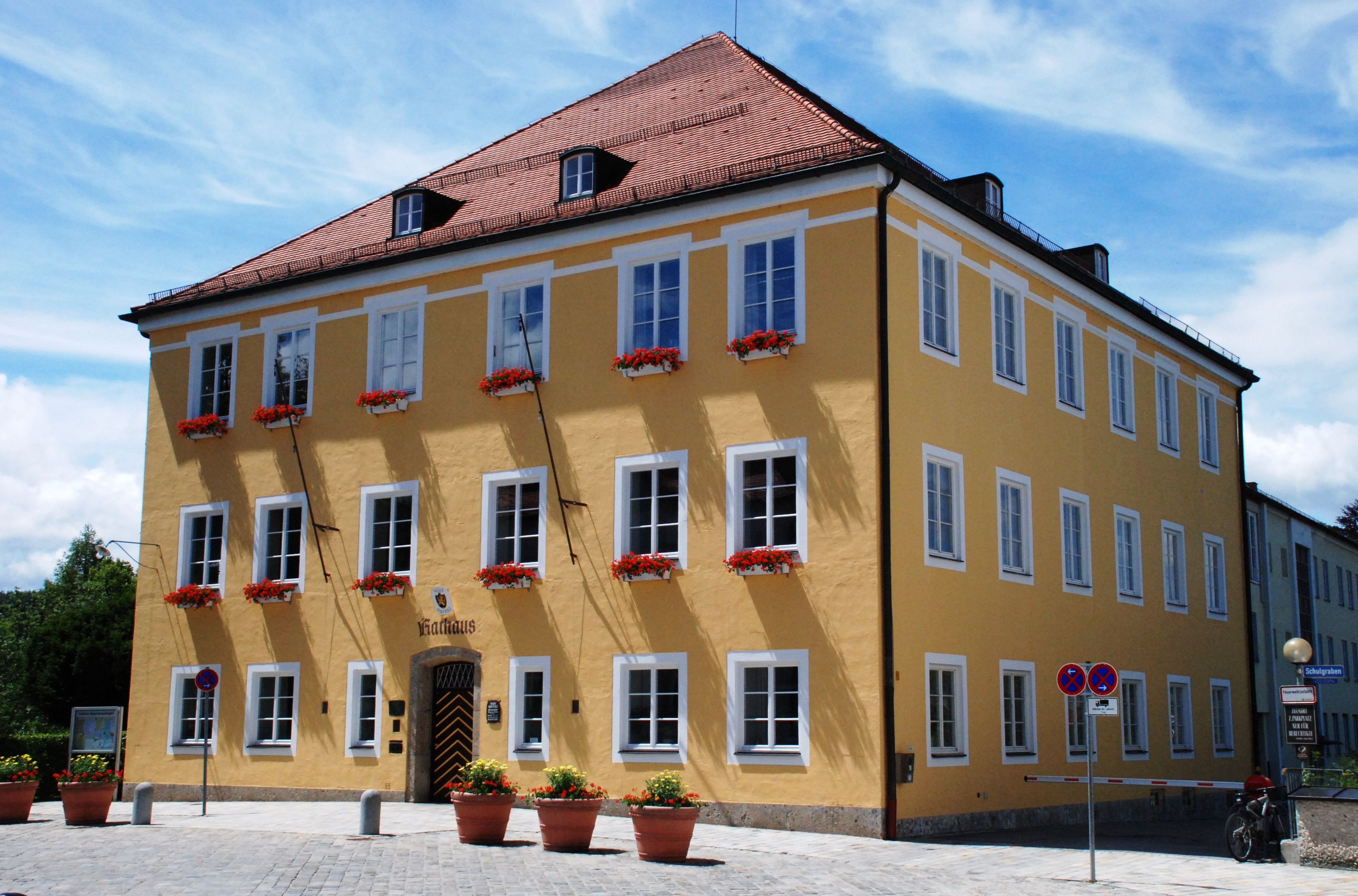 Schloßplatz 1 in Bad Tölz, Landkreis Bad Tölz-Wolfratshausen, Regierungsbezirk Oberbayern, Bayern; ehemaliges Landgericht, dann Rathaus. Dreigeschossiger freistehender Zeltdachbau mit Putzgliederung. Laut moderner Gebäudetafel 1772 als Ersatz für das 1770 eingestürzte Schloss errichtet, ab 1779 Sitz des Landrichters, 1862 um ein Stockwerk erhöht und Sitz des Bezirksamts, ab 1938 Landratsamt, 1958 nach Westen erweitert und 1979 durch die Stadt Bad Tölz als Rathaus erworben.